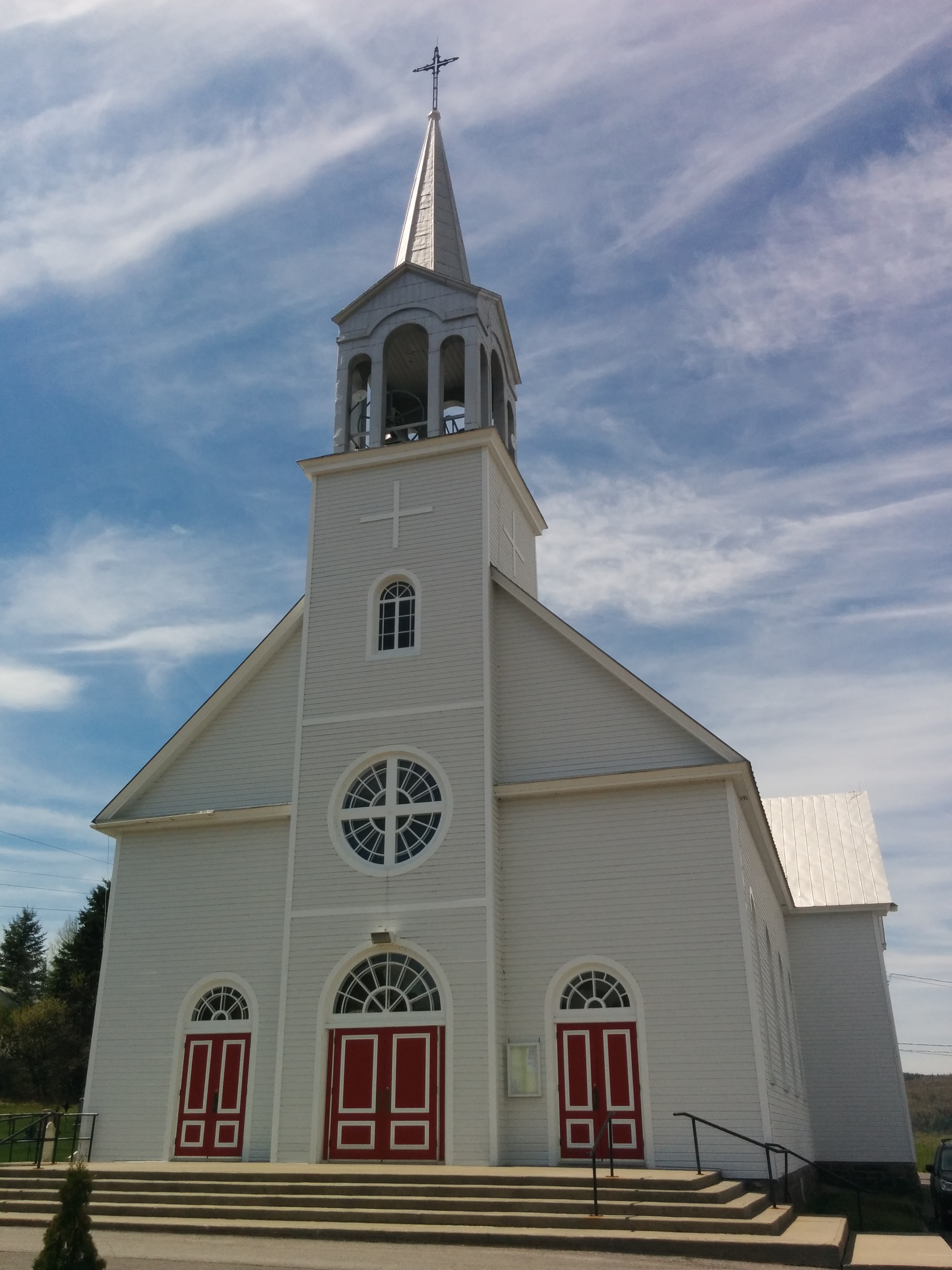 Église de Saint-Zénon.